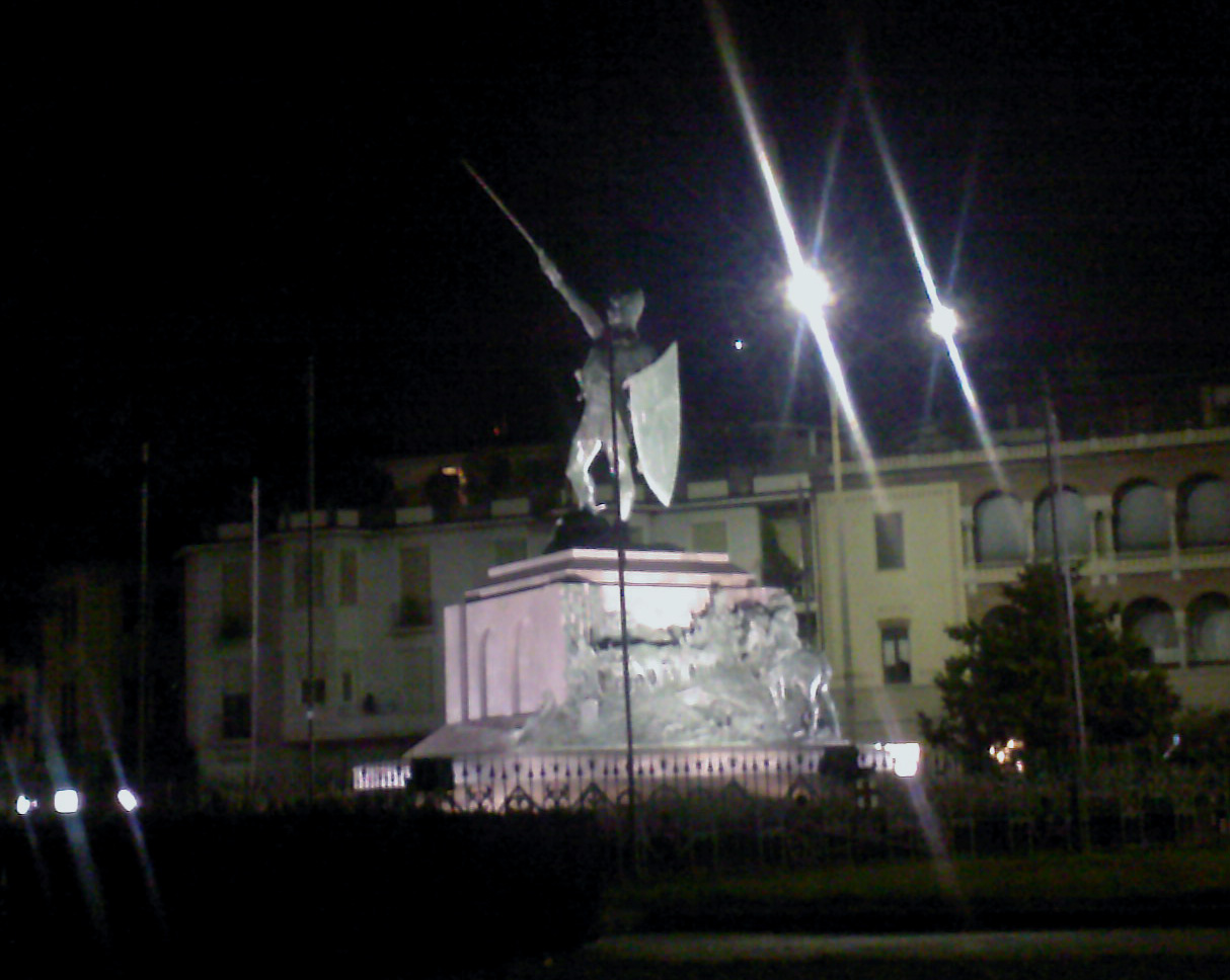 Monumento di Alberto da Giussano (Legnano, Italy)